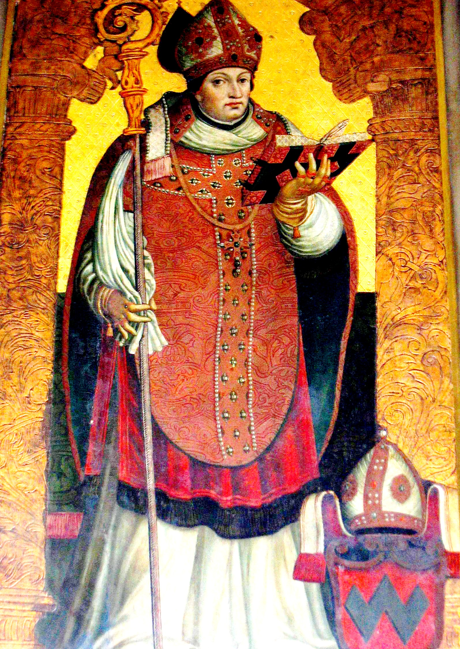 Jan Chojeński Bishop of Kraków author-Maciej Szczepańczyk user:Mathiasrex